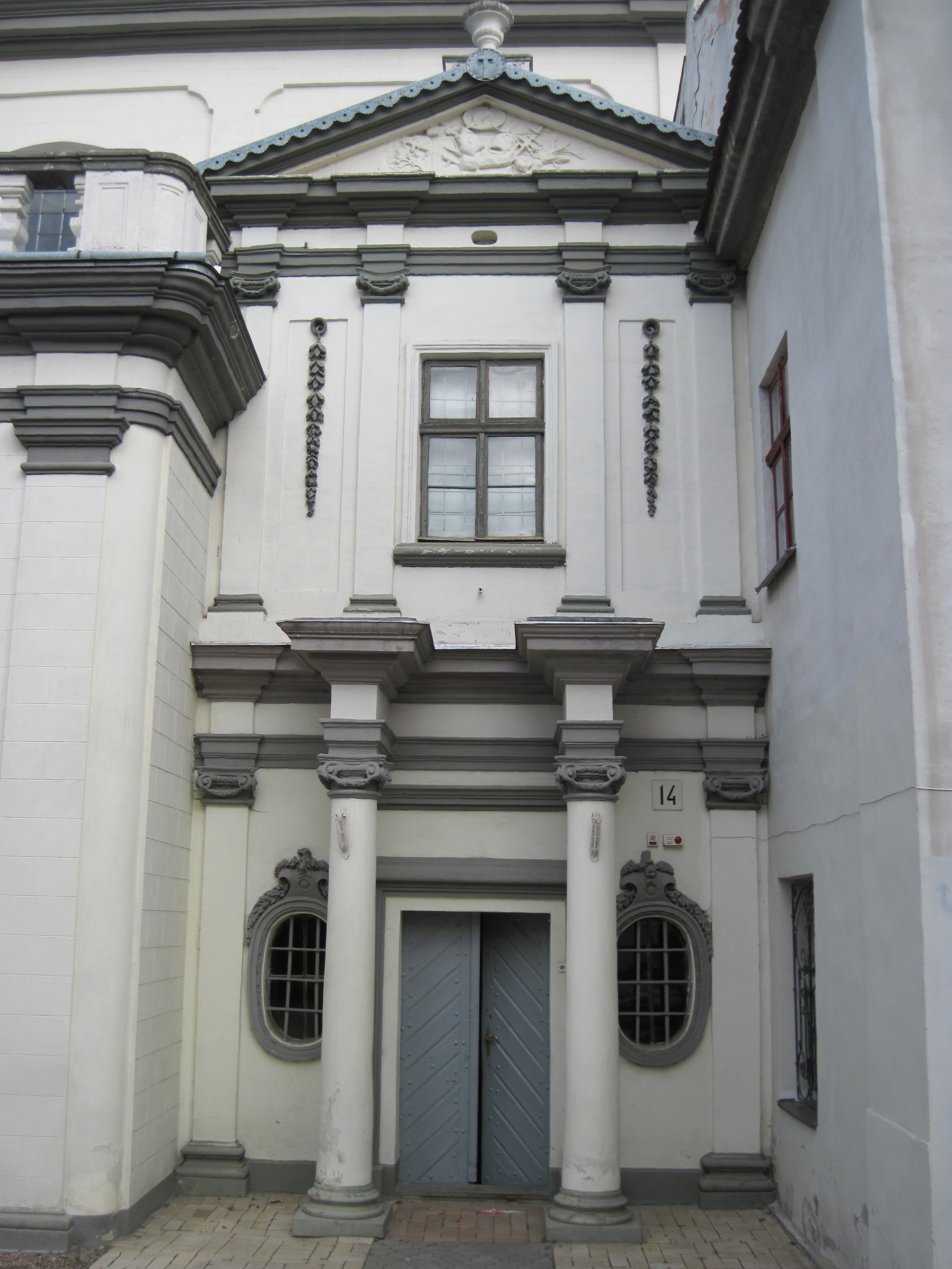 Катедра, Тернопіль. Вхід до ДІА, осінь 2013